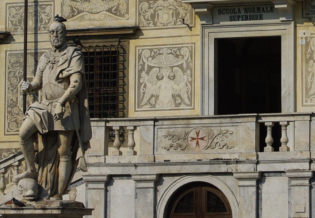 Statue de Cosme Ier de Médicis devant la Scuola Normale Superiore à Pise